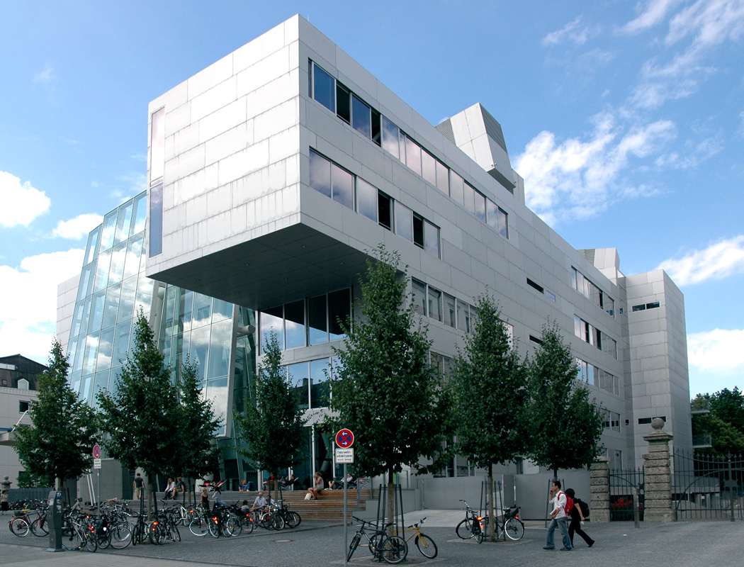 Akademie der Bildenden Künste München - Erweiterungsbau von Coop Himmelb(l)au.